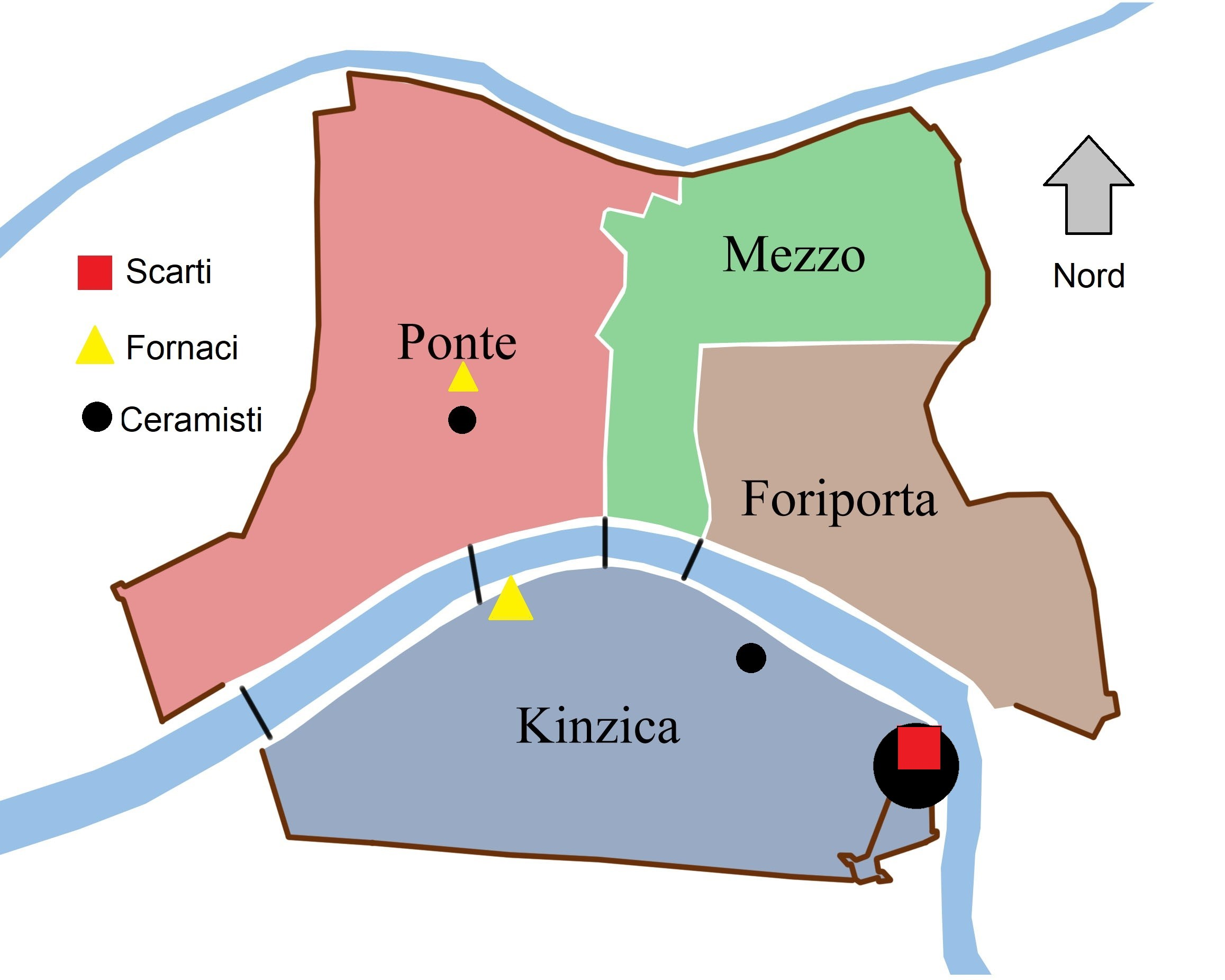 Mappa che mostra approssimativamente la presenza dei ceramisti e delle fornaci durante il XIII secolo. Sono anche indicati i punti cittadini dove sono state rinvenute discariche di scarti di fornace o d'uso. (La grandezza dei cerchi che indicano i ceramisti varia. In base a questa i cerchi indicano da 1 a 7 ceramisti, sopra i 7 viene esplicitato il numero).